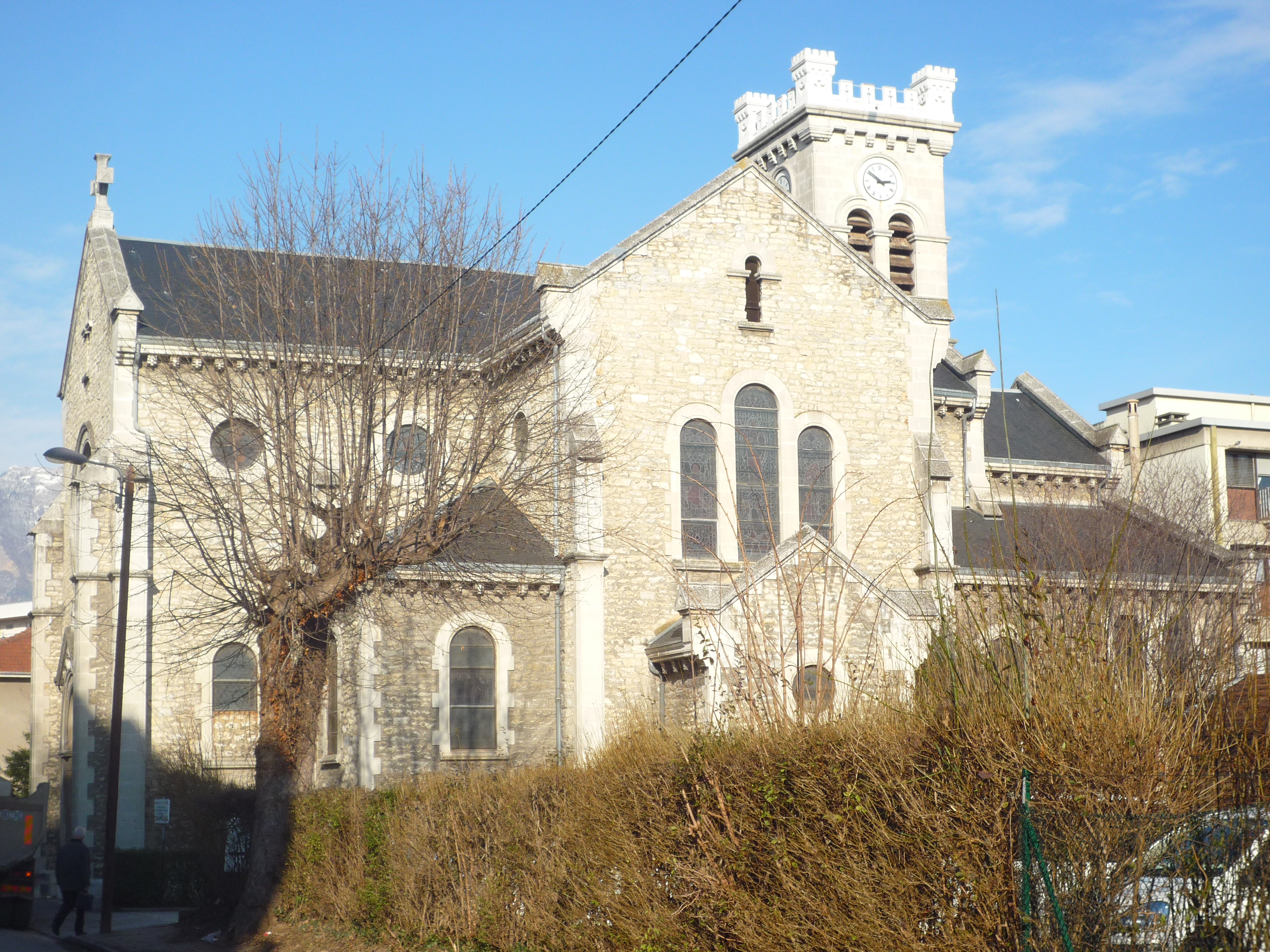 Eglise Saint François de Sales (1912), rue Saint François de Sales - Grenoble